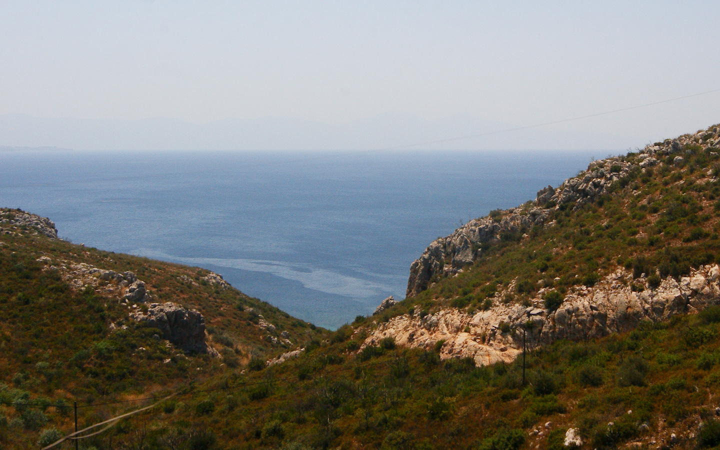 Bucht in Izmir, Türkei